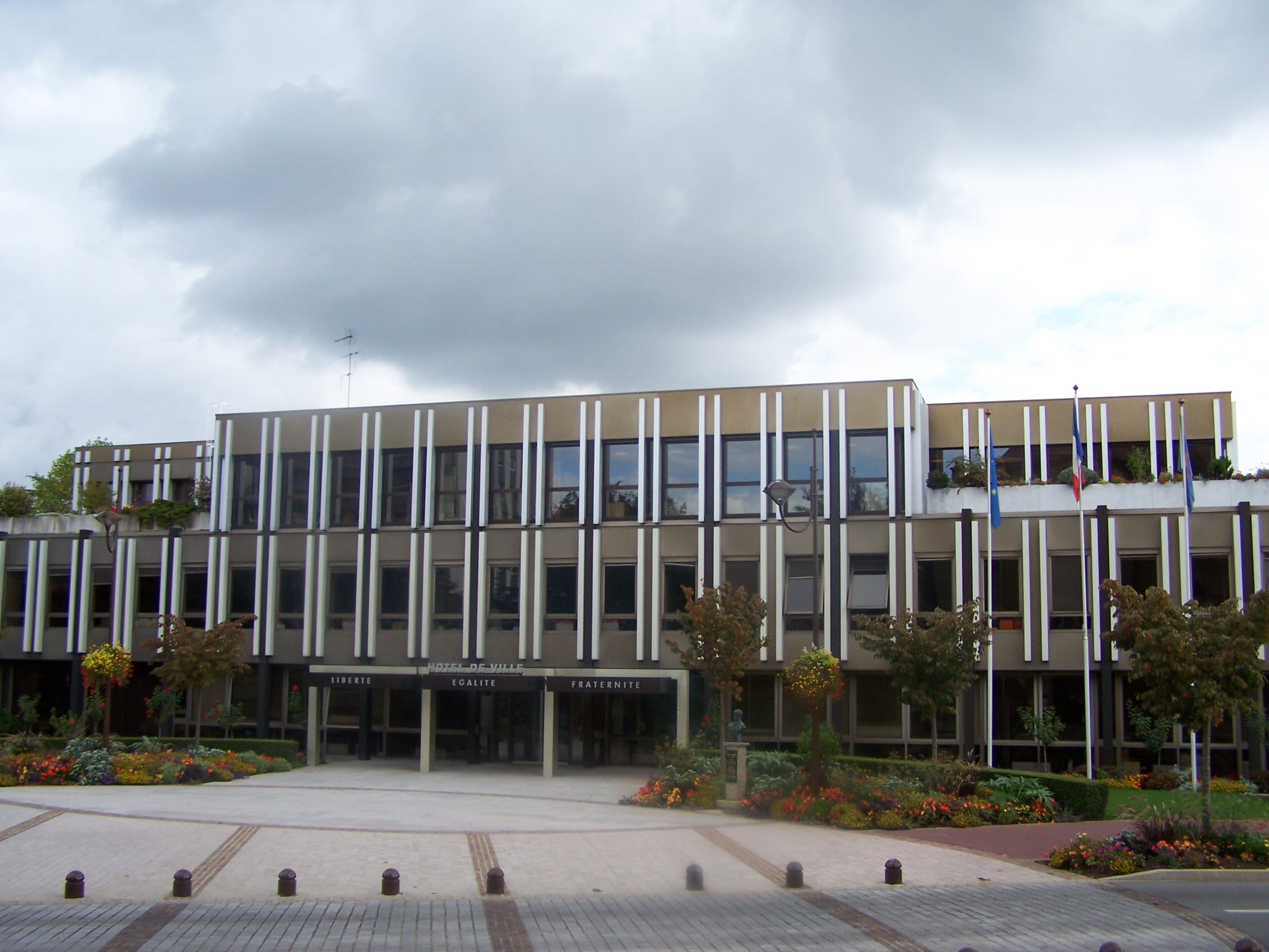 Mairie de Vélizy-Villacoublay (Yvelines, France)